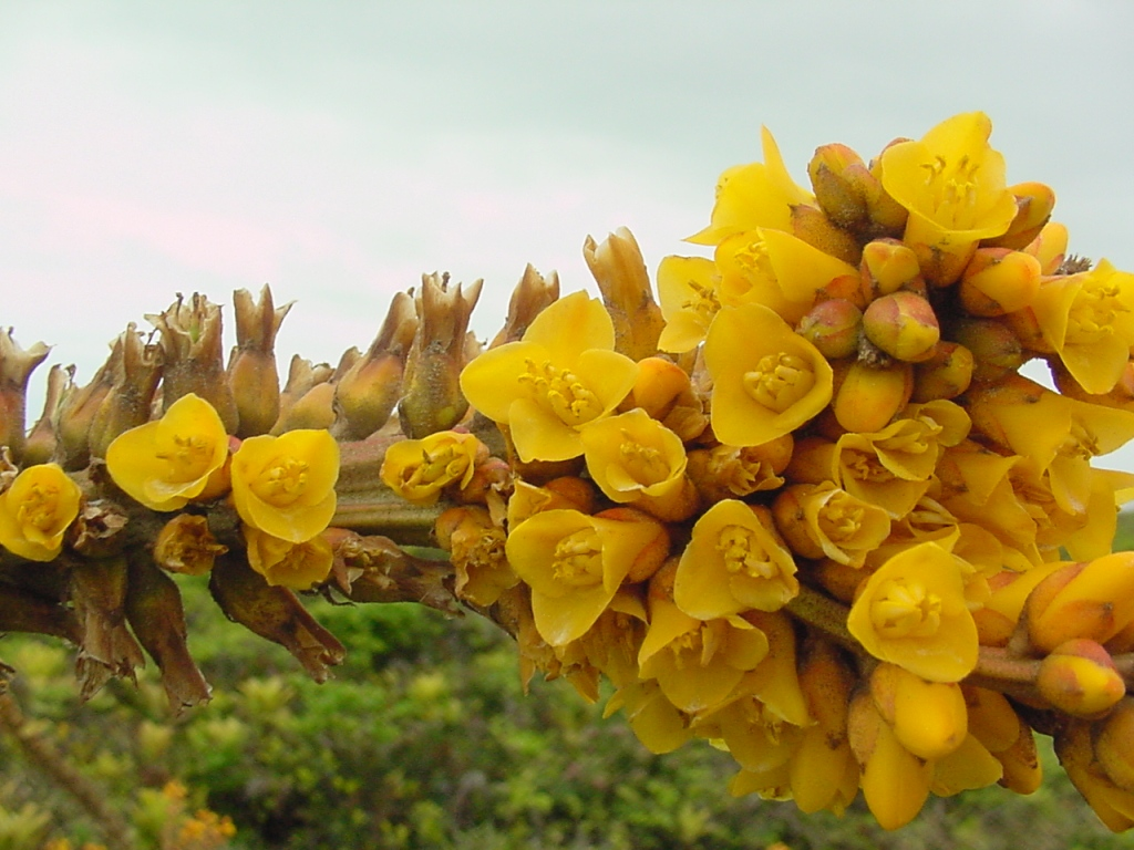 Dyckia encholirioides - BROMELIACEAE - Praia do Ervino - S�o Francisco do Sul - SC - Brasil